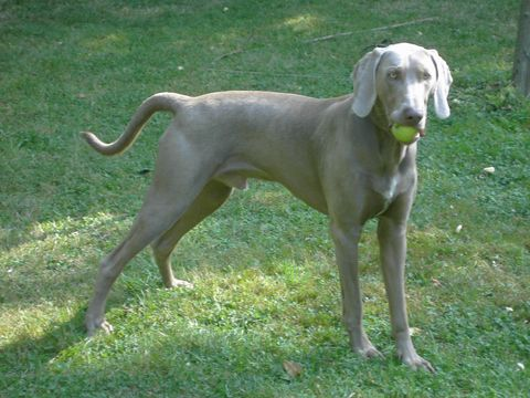 Weimaraner „Amigo“ mit Apfel.